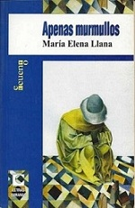 MaríaELL5